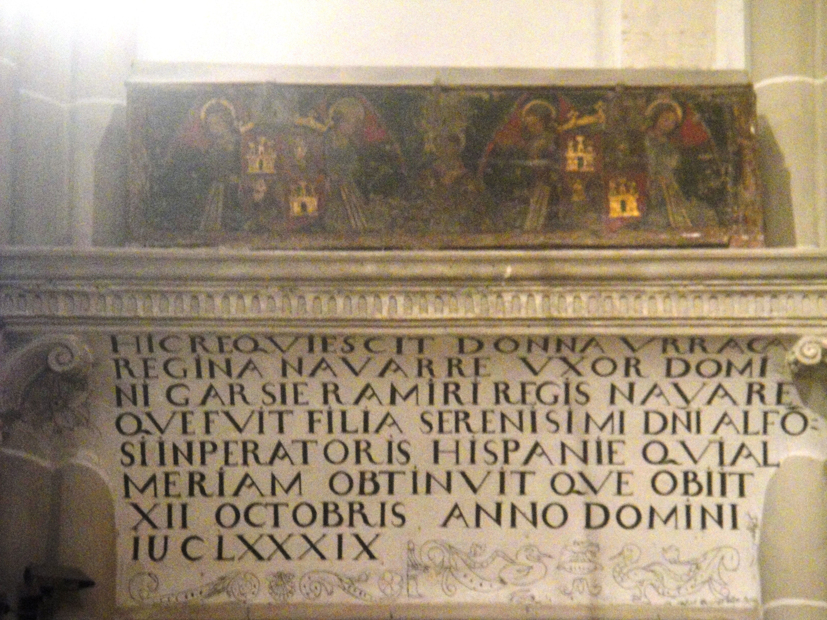 Arcón de madera que contiene los restos mortales de la reina Urraca la Asturiana, hija ilegítima del rey Alfonso VII de León y de la dama Gontrodo Pérez y esposa de García Ramírez de Pamplona, rey de Pamplona. El arcón fue realizado en el siglo XVI y se encuentra colocado en la parte superior del lado del Evangelio de la capilla del Sagrario de la catedral de Palencia, provincia de Palencia, (España).